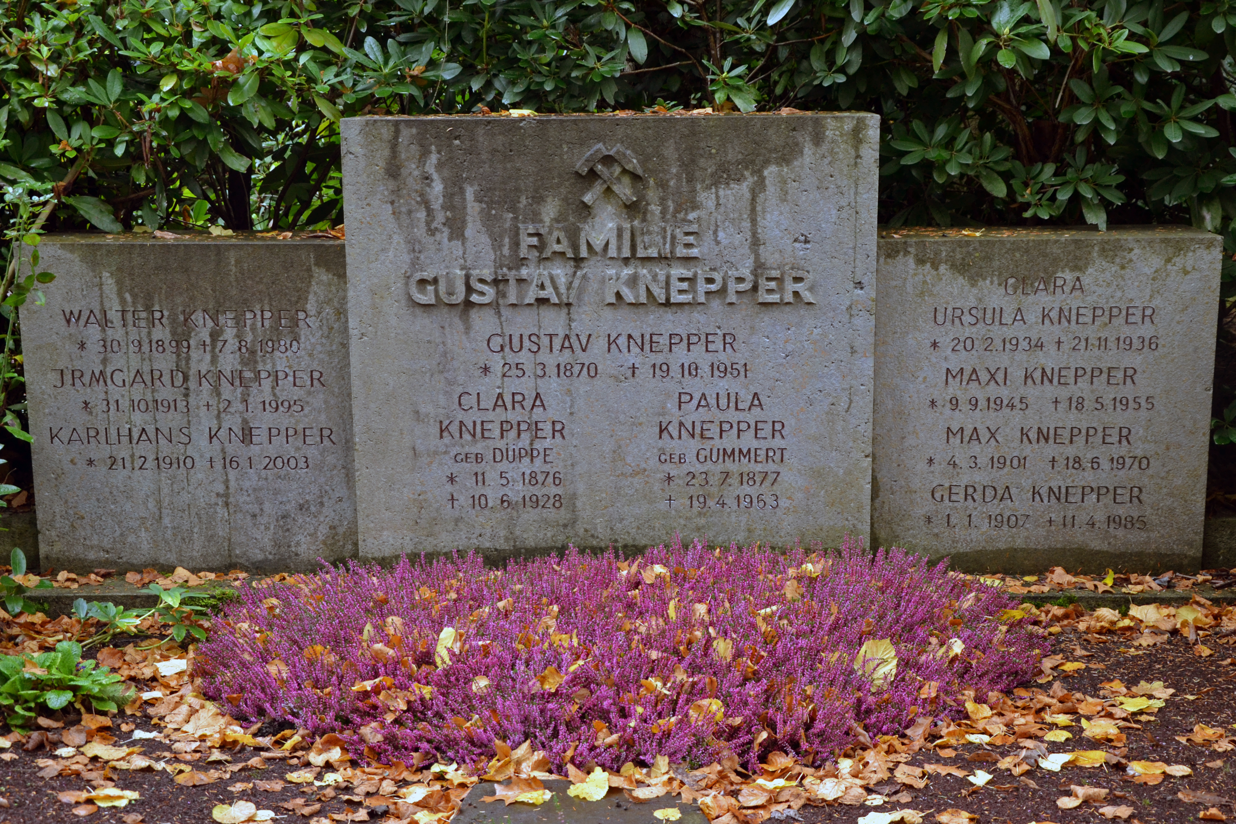 Friedhof Essen-Bredeney, Grabmal Gustav Knepper, deutscher Bergwerksdirektor im Ruhrgebiet